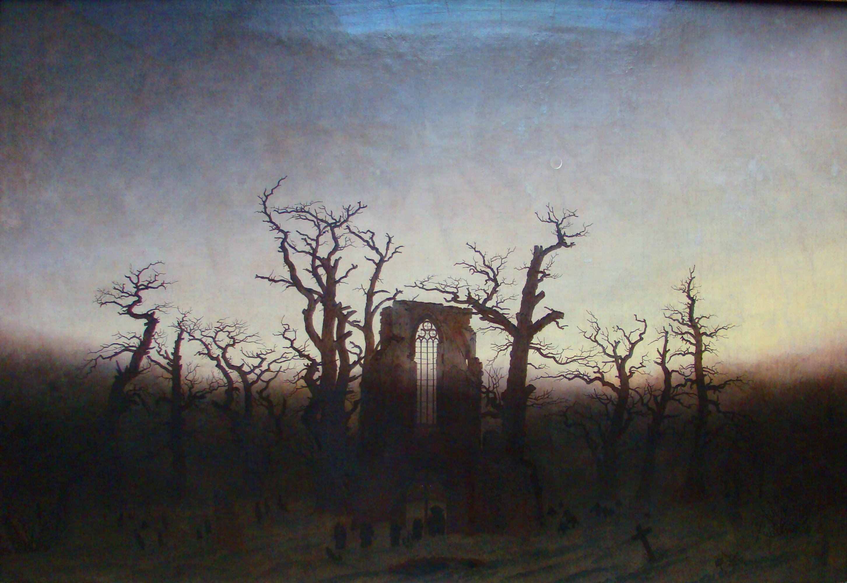 Abtei im EichwaldAbbey among Oak Treestitle QS:P1476,de:"Abtei im Eichwald" label QS:Lde,"Abtei im Eichwald" label QS:Lit,"Abbazia nel querceto" label QS:Lja,"楡の木のある僧院" label QS:Lfr,"L’Abbaye dans un bois" label QS:Lpl,"Opactwo w dębowym lesie" label QS:Les,"La abadía en el robledal" label QS:Lru,"Аббатство в дубовом лесу" label QS:Lfi,"Luostarikirkko tammimetsässä" label QS:Len,"Abbey among Oak Trees" label QS:Leo,"Abatejo en la Kverkforsto" label QS:Lmk,"Опатија во дабовата шума" label QS:Ltr,"Meşe Ormanında Manastır"